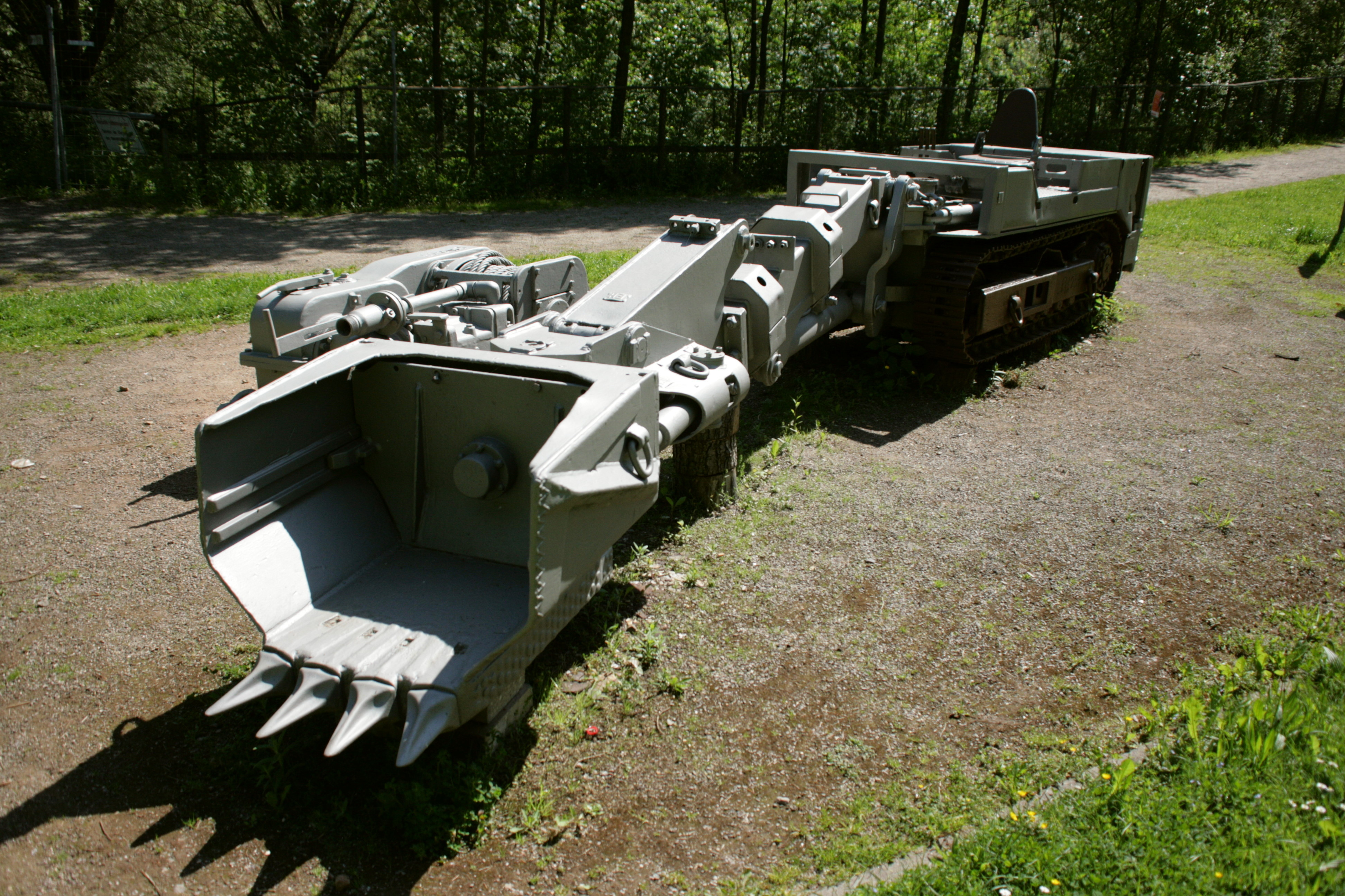 Park am Malakowturm, gegenüber Zeche Alte Haase, Hattinger Straße in Sprockhövel.